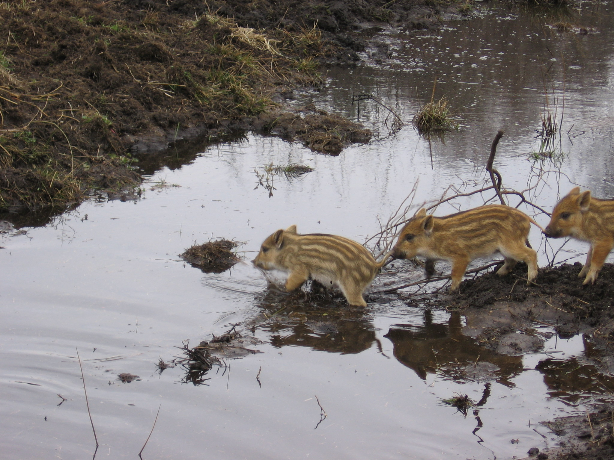 Warchlaki dzika